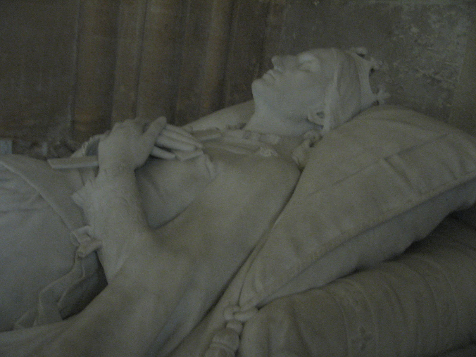 Marie-Caroline de Bourbon-Deux-Siciles, duchesse d'Aumale, inhumée dans la chapelle Saint-Charles Borromée à Weybridge, transférée en 1876